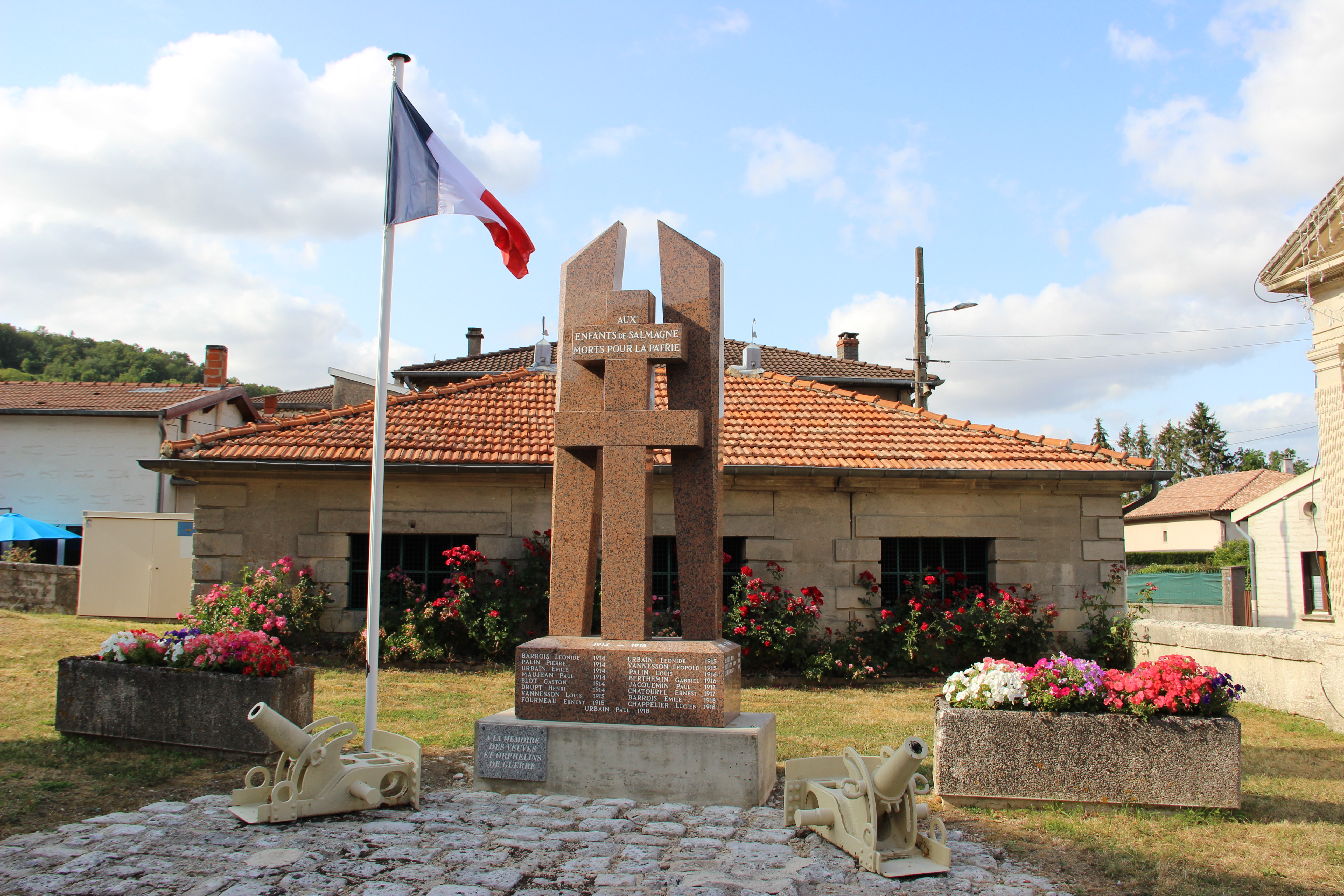 Le monument aux morts.